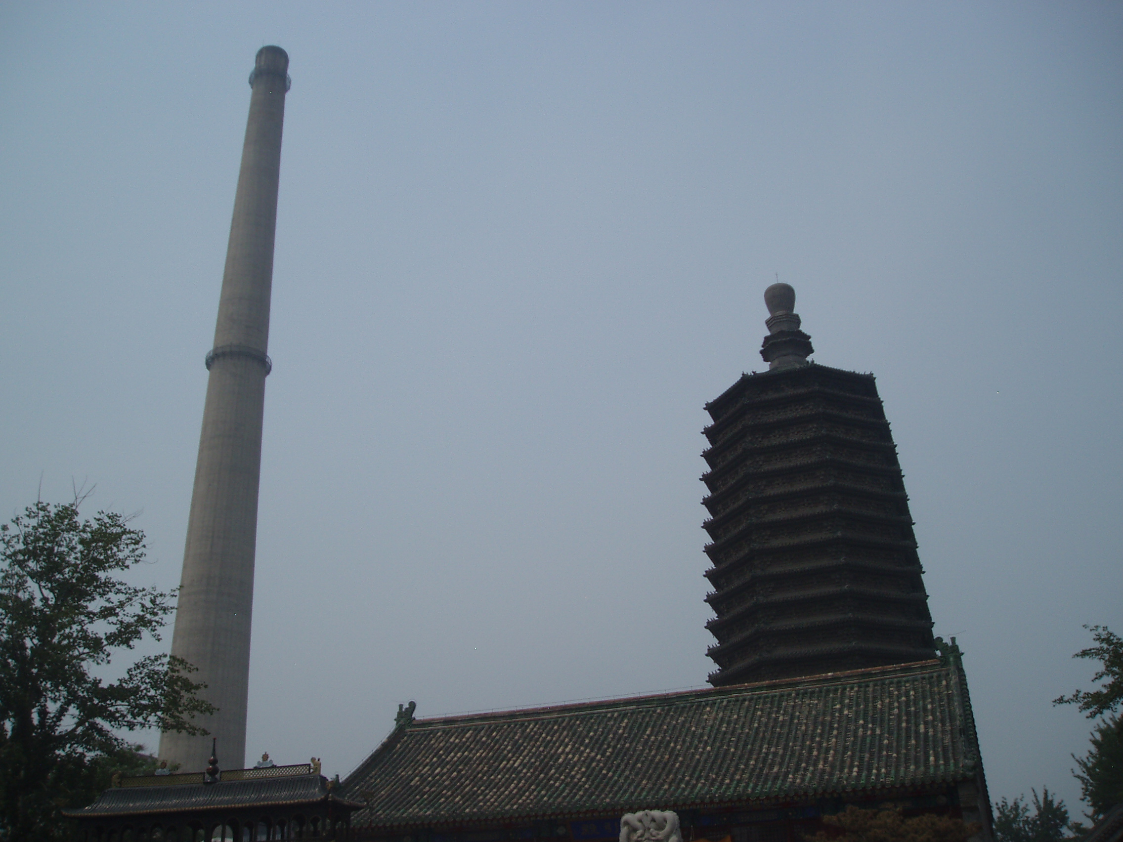 Tianning Temple Pagoda in Beijing